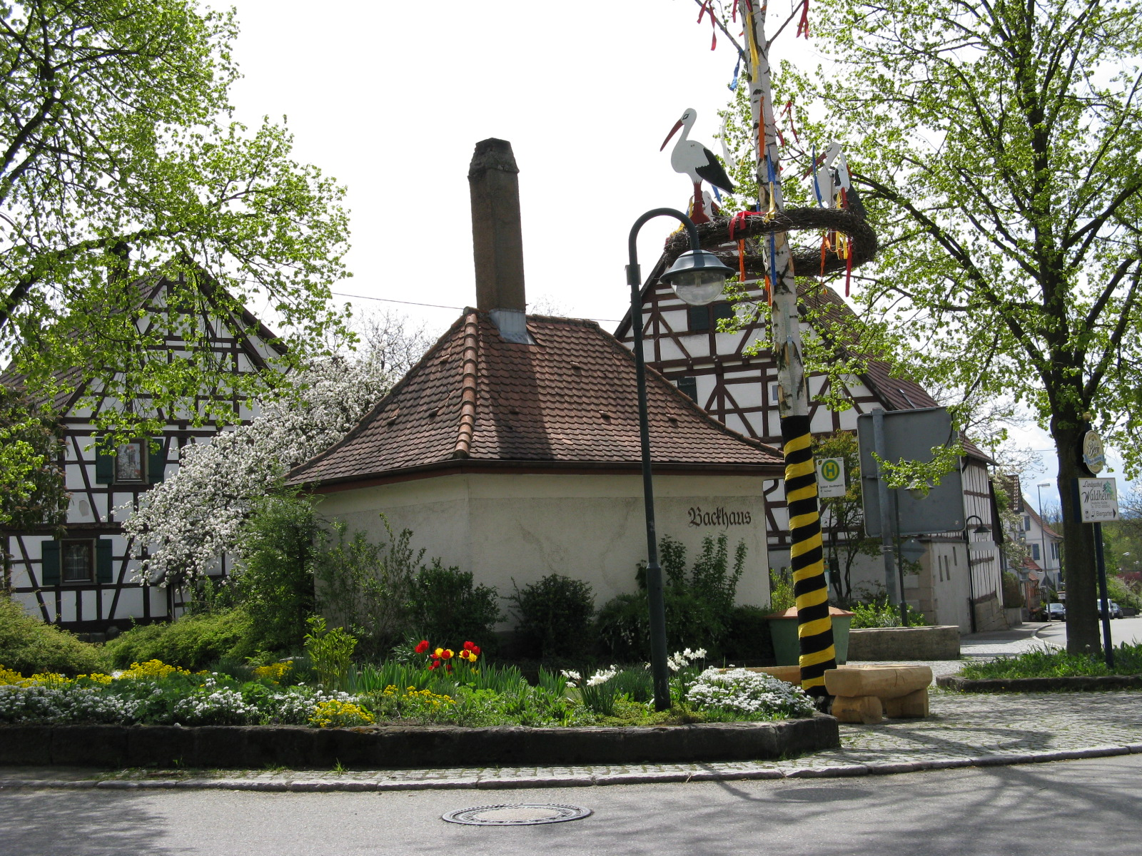 Altes Backhaus Pliezhausen-Gniebel mit Maibaum